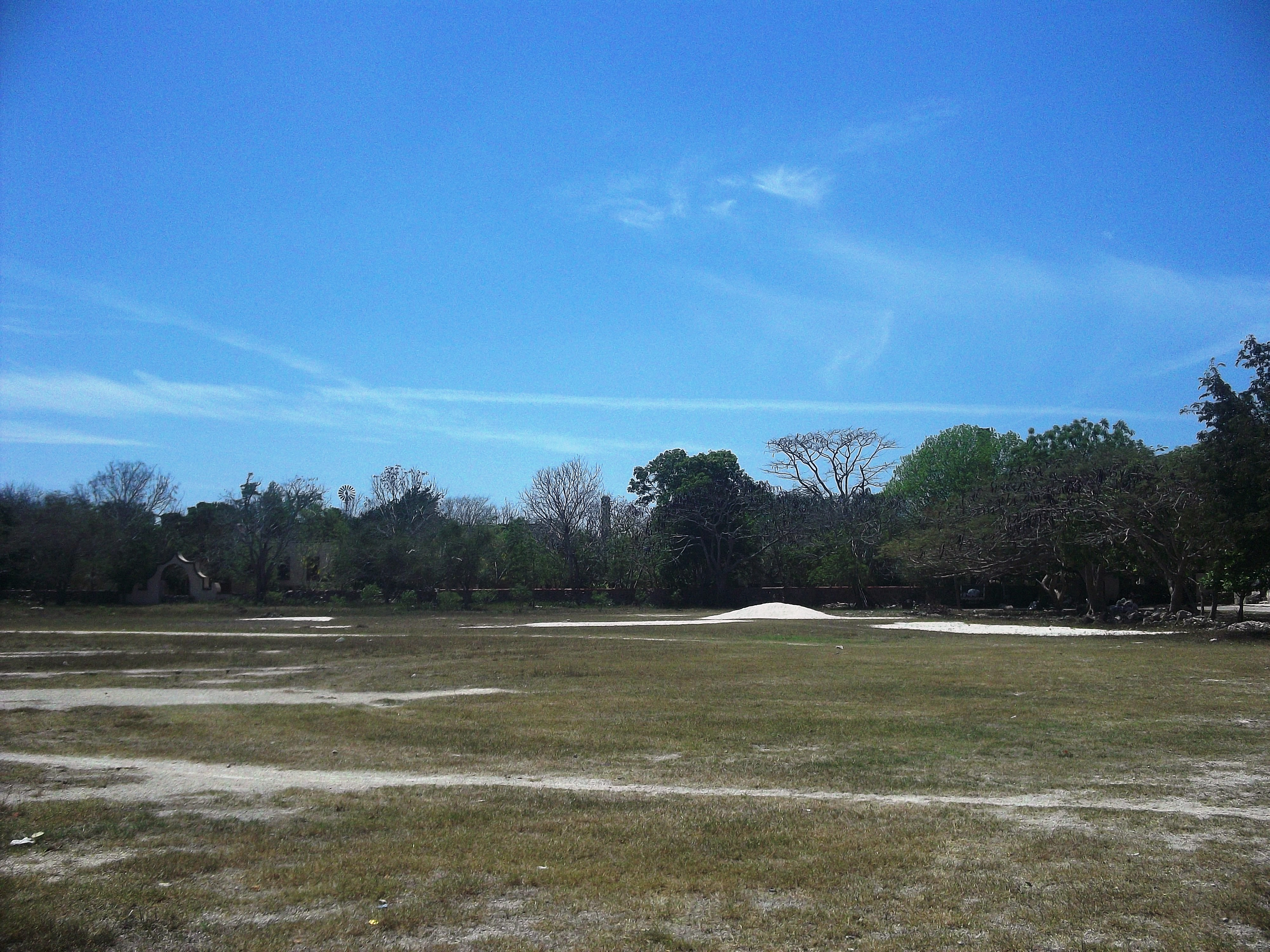 Vista de la hacienda San Francisco Manzanilla, Yucatán.